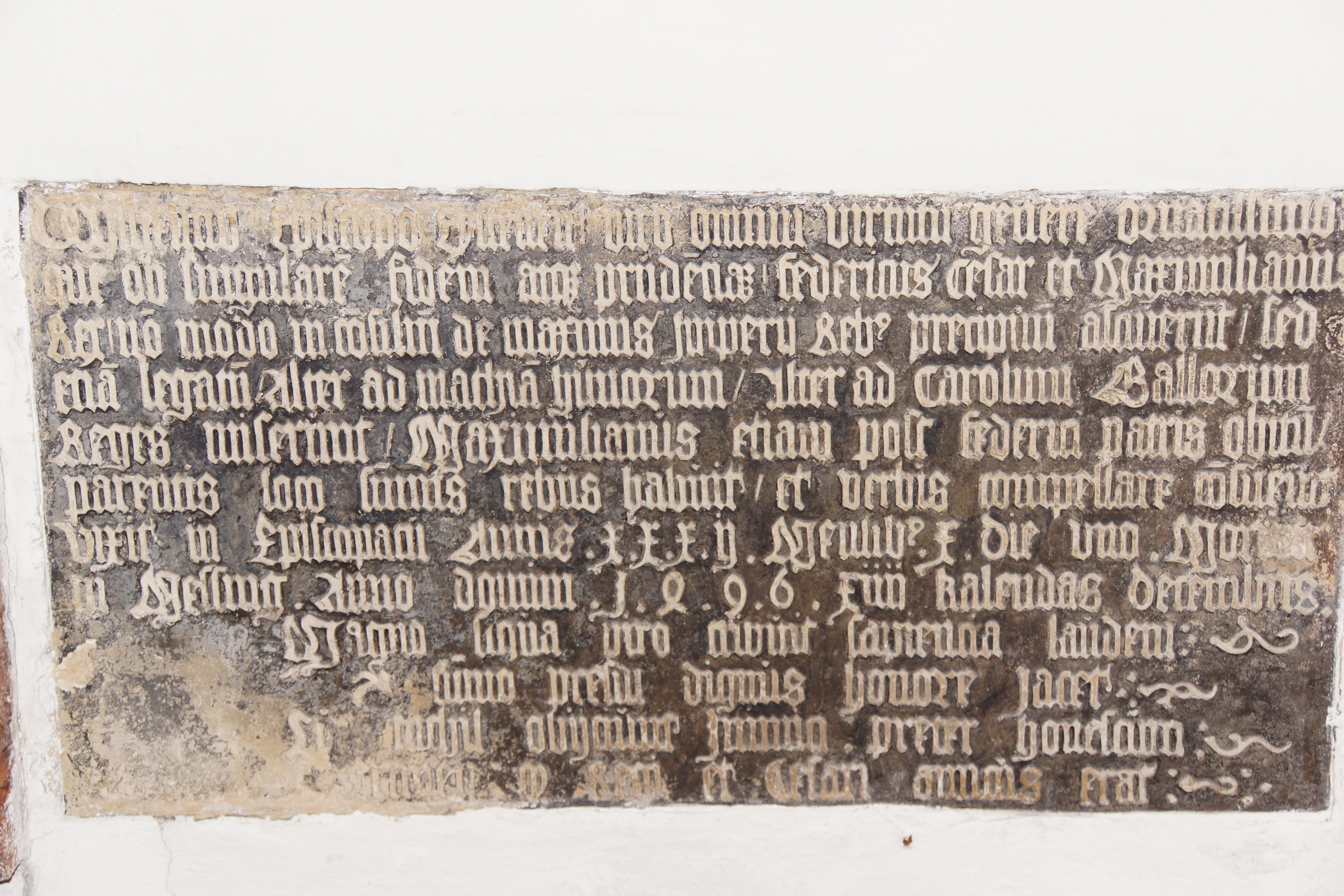 Der Willibaldsdom zu Eichstätt